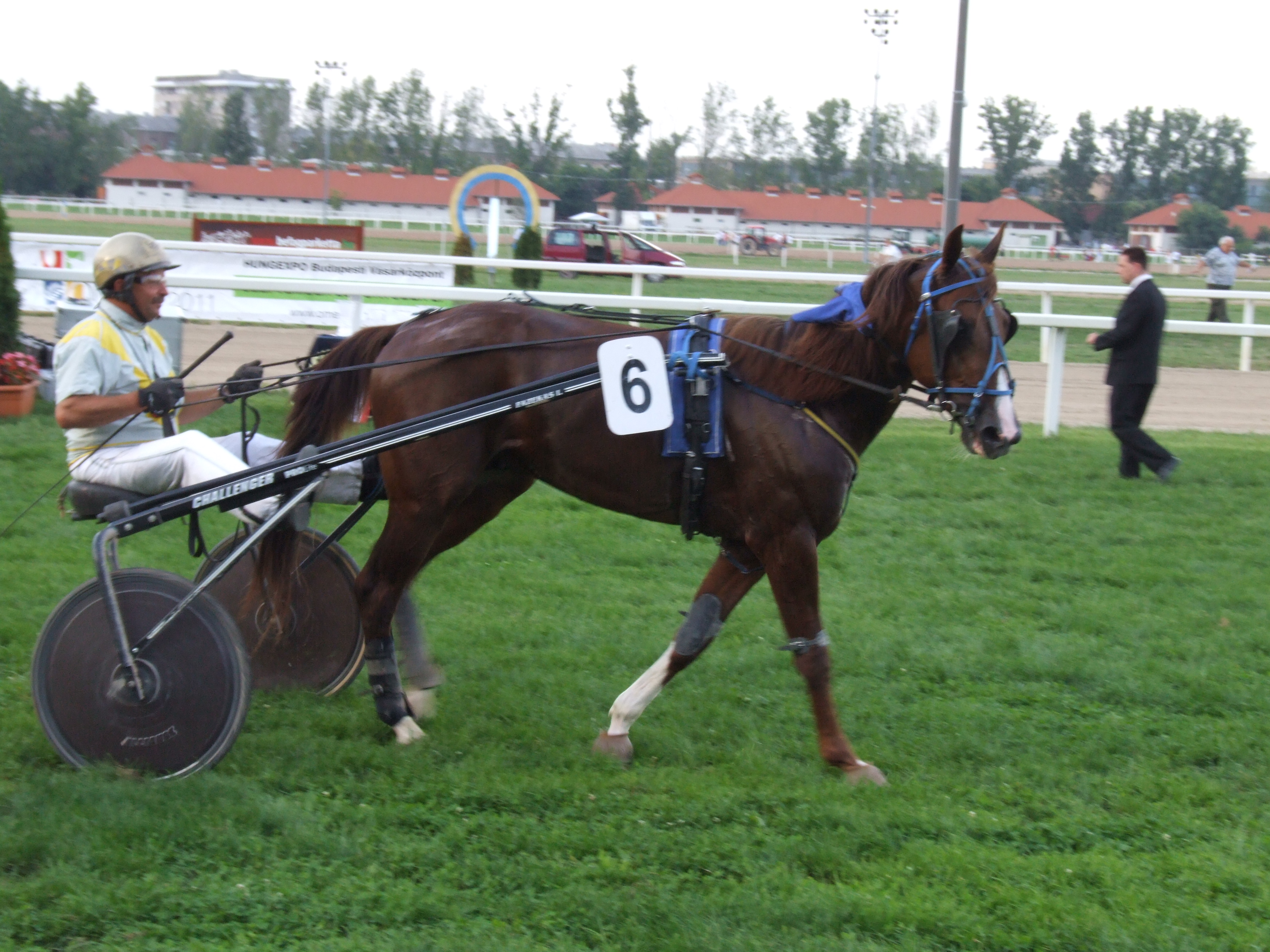 A 2011-es Magyar Ügetőderby. A győztes ló, Oguz valamint a tréner és hajtó egy személyben Fazekas Imre. Kincsem Park, Budapest, Albertirsai út.